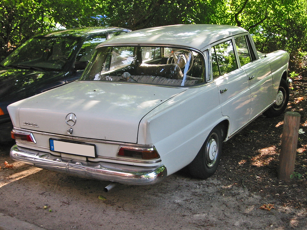 Beschreibung: Mercedes "Kleine Flosse" Quelle: selbst fotografiert Fotograf: Sven Storbeck